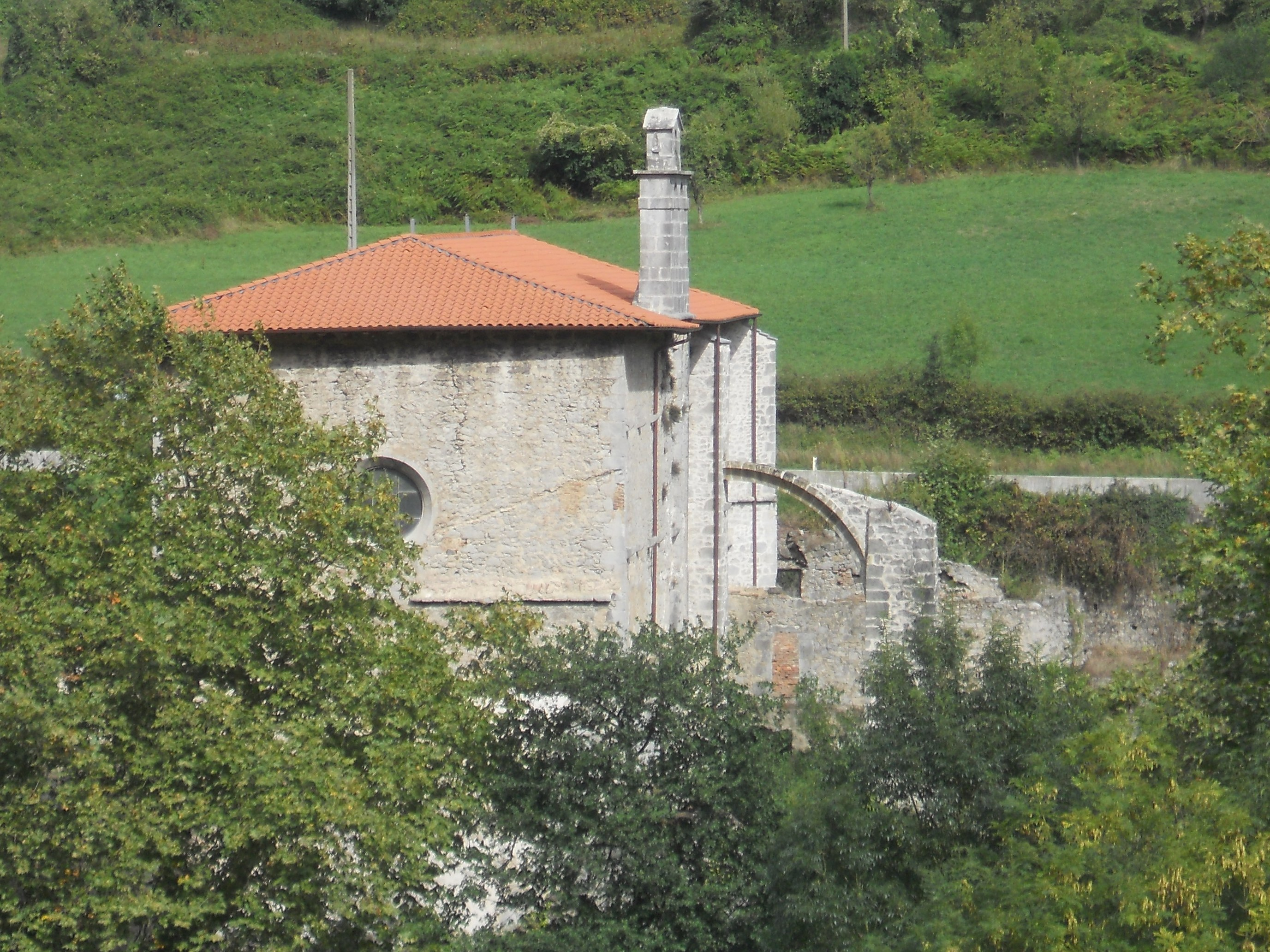 Sasiolako eliza, ibaiaren beste aldetik